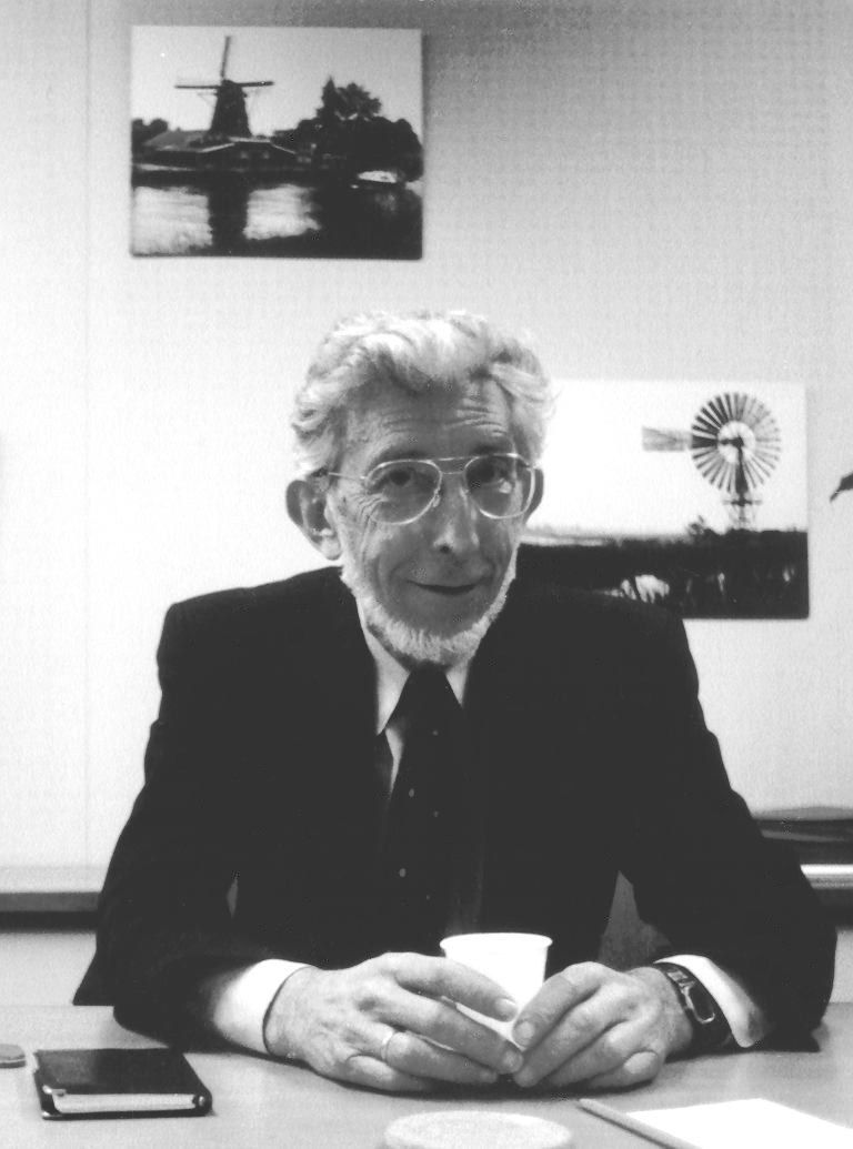 Professor Jan in 't Veld, TU Delft 1991